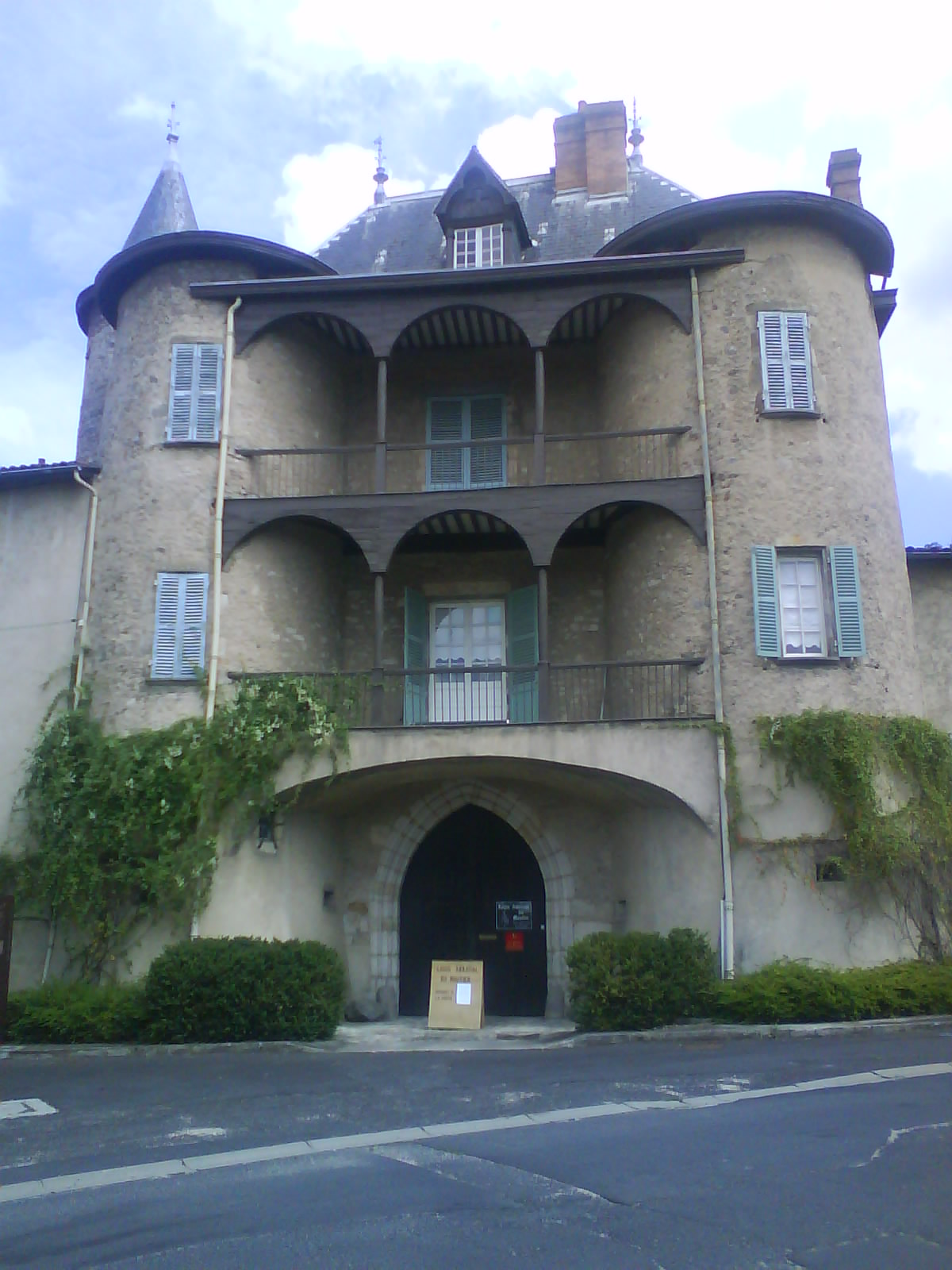 Logis abbatial du moutier, Thiers